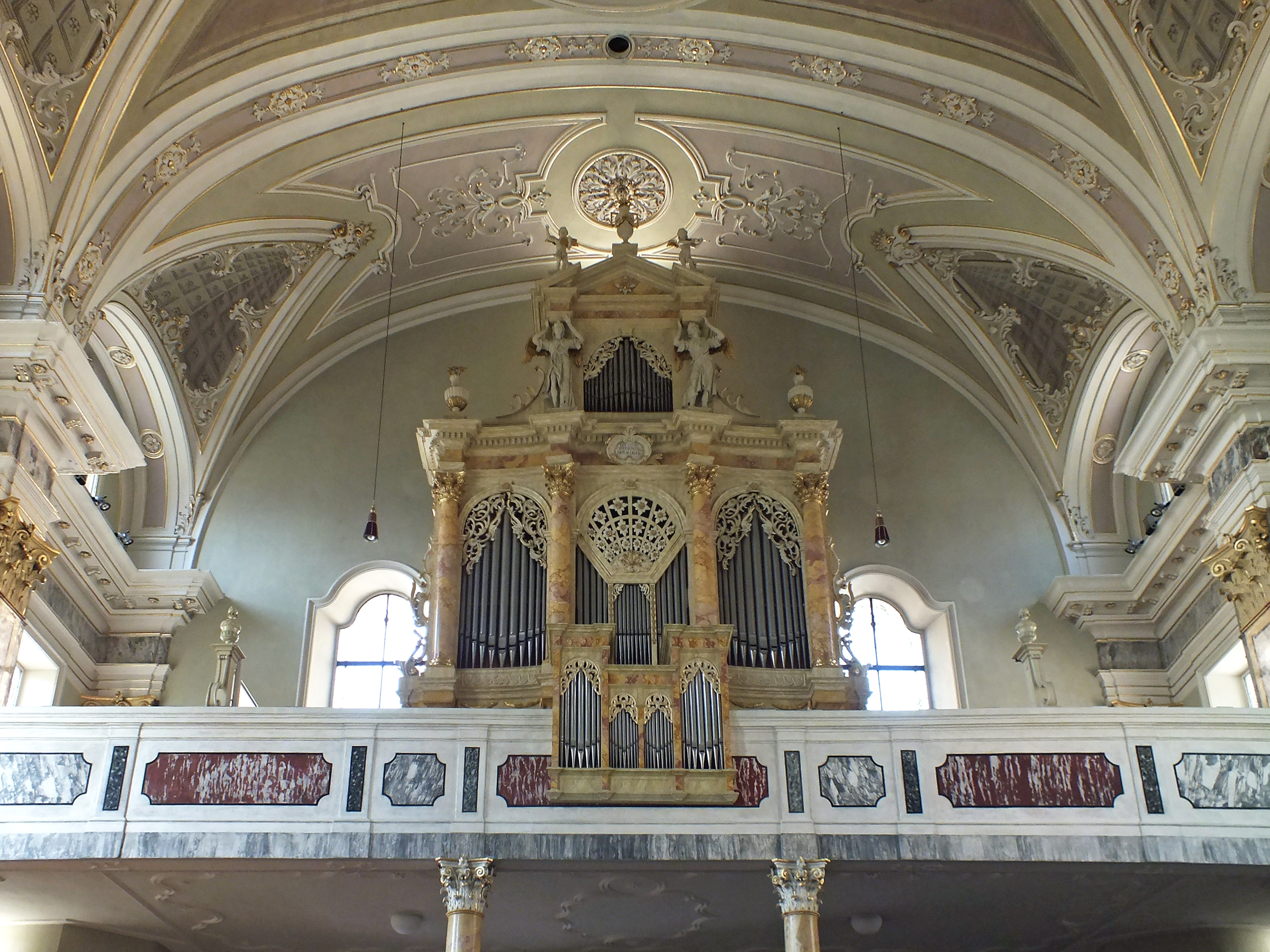 Die Orgelempore der Pfarrkirche Maria Himmelfahrt in Kaltern